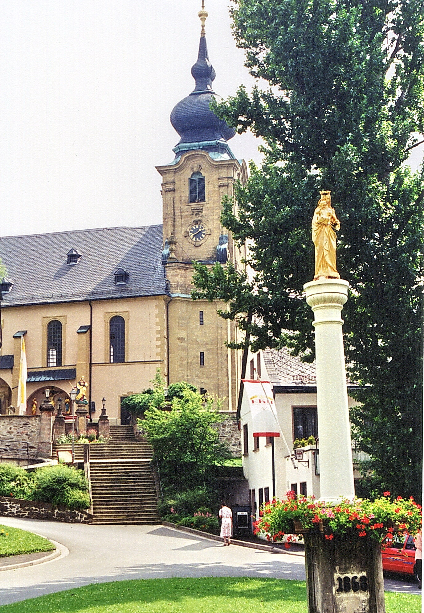 Basilika Marienweiher, Klosterkirche Mariä Heimsuchung und Mariensäule